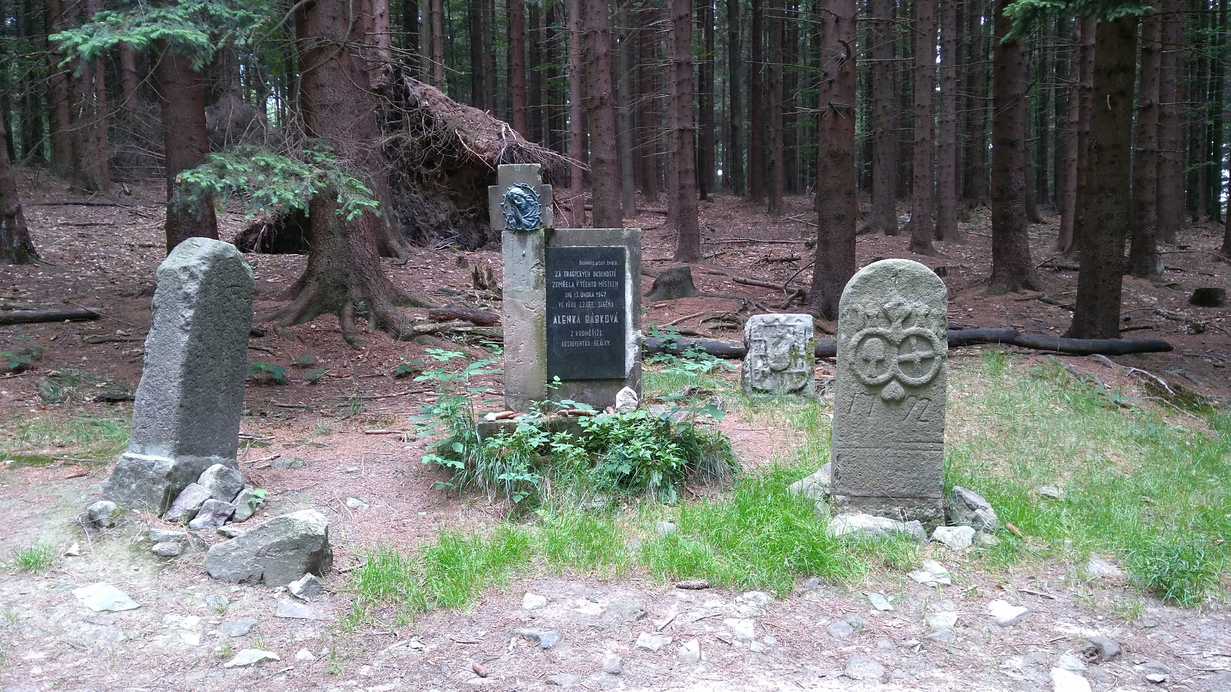 U Tří kamenů - rozcestí turistických cest v Hostýnských vrších